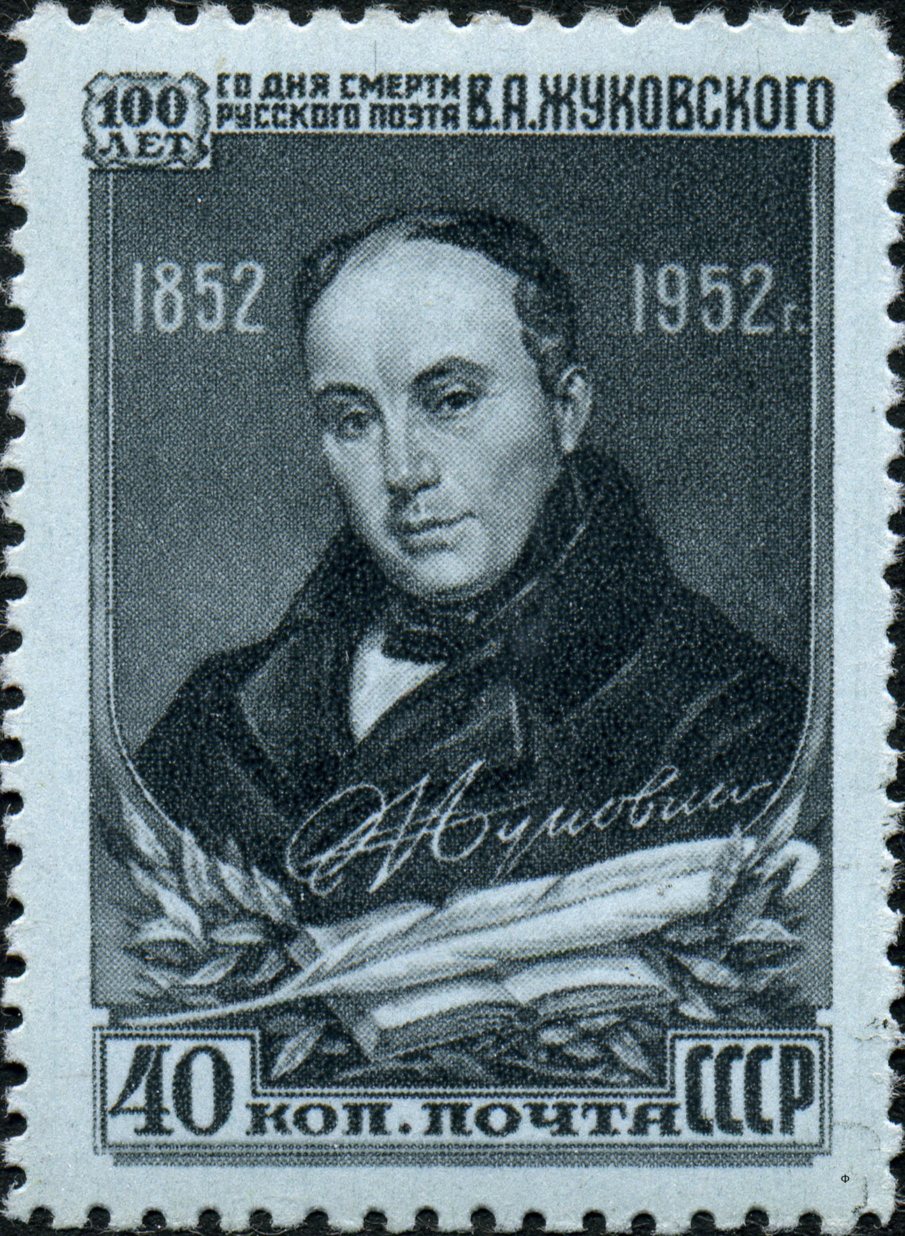 Марка СССР